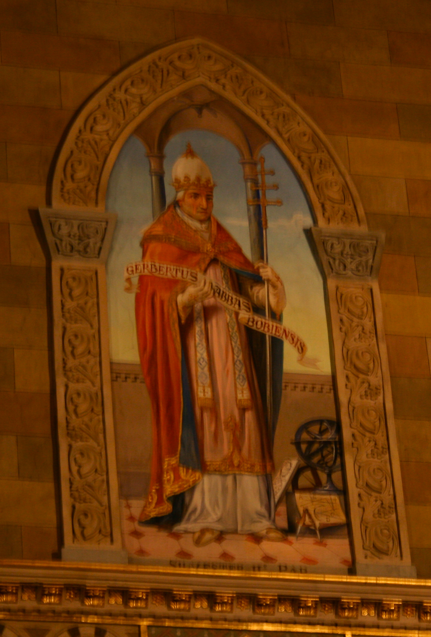 Foto, Gerberto d'Aurillac abate di Bobbio, futuro Papa Silvestro II, licenza libera